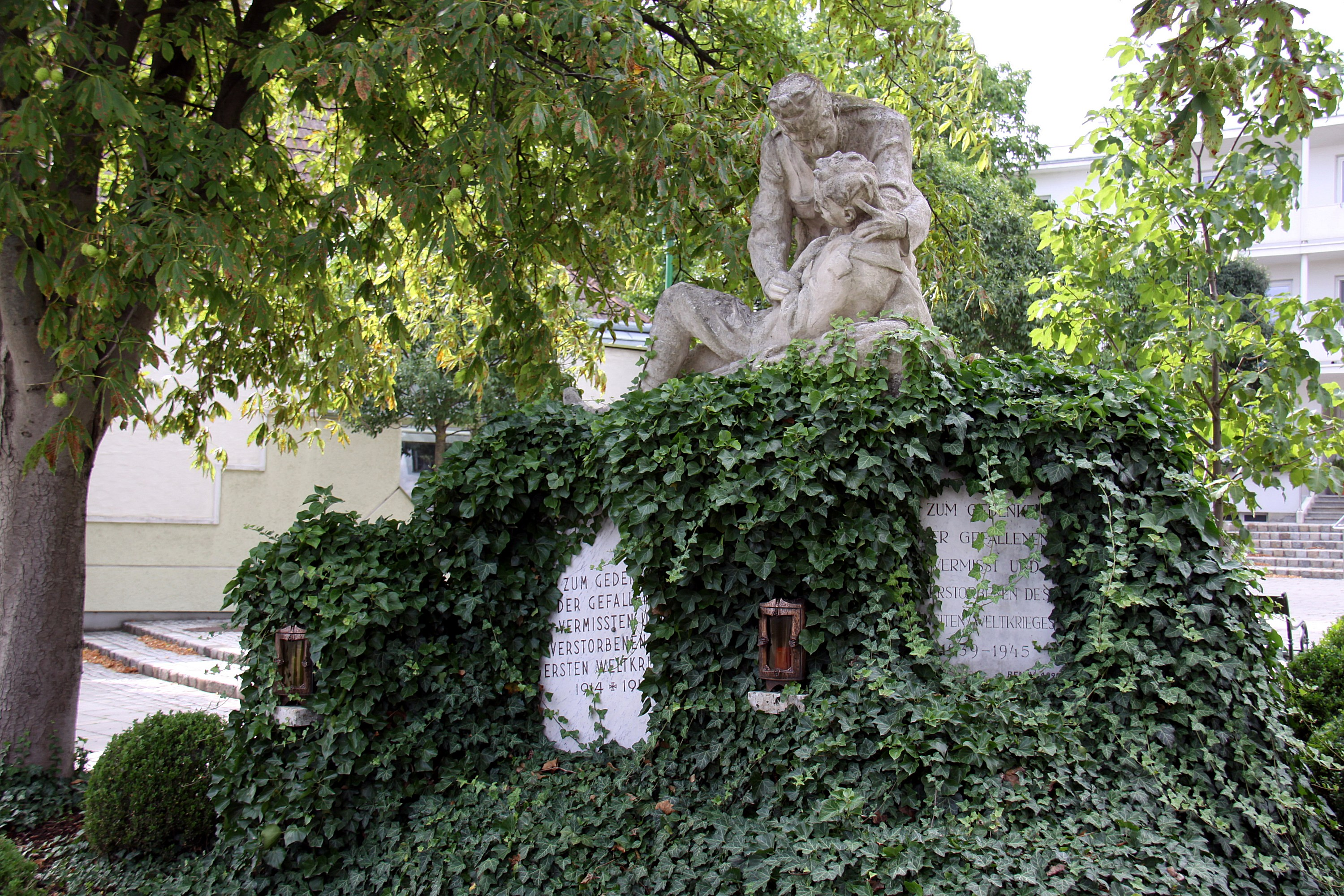 Kriegsopferdenkmal in Pöttsching.